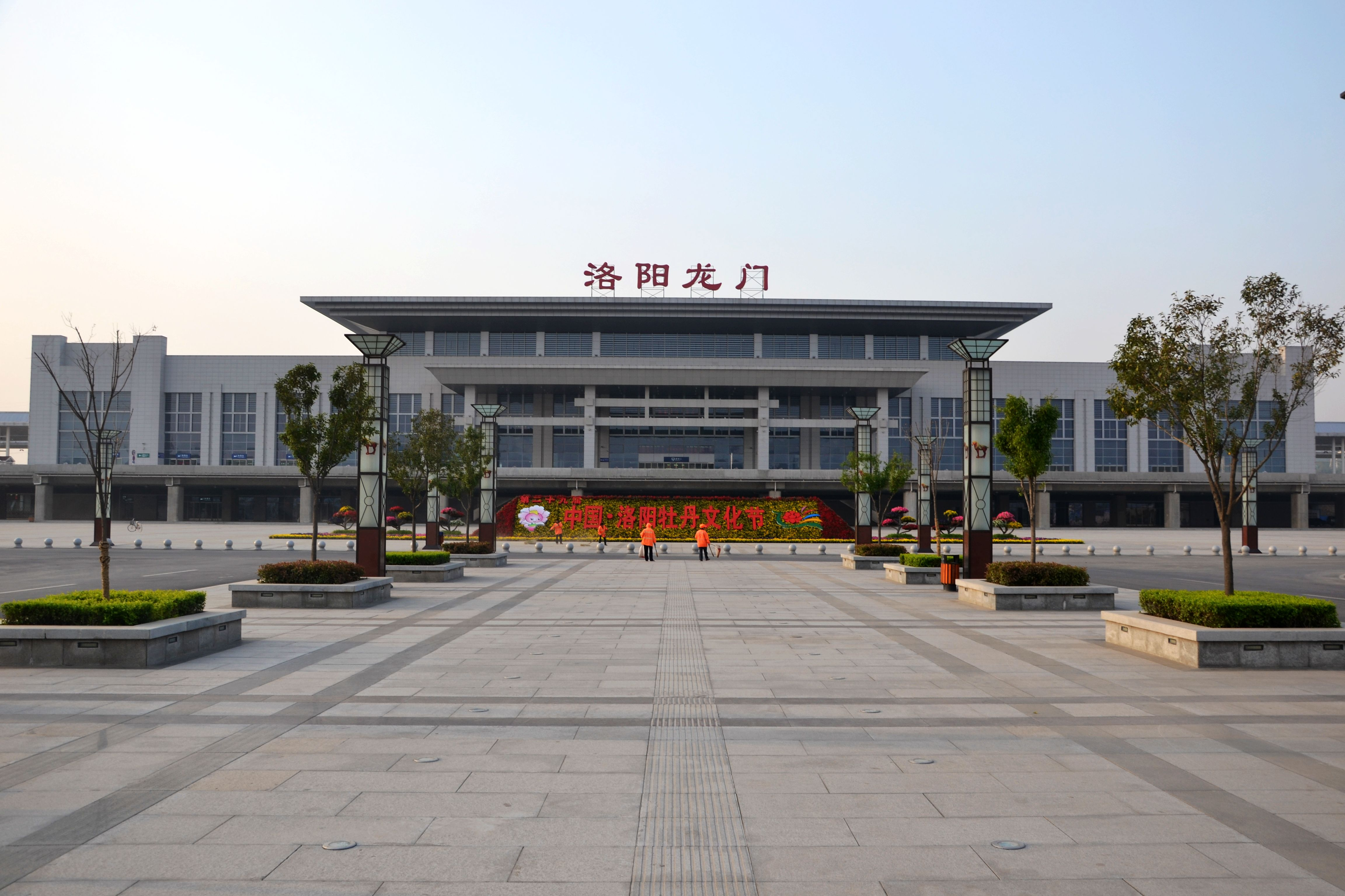 洛阳龙门高铁站